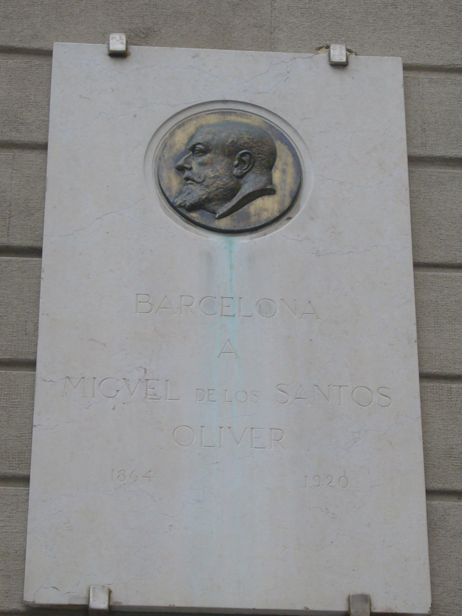 Placa a Miquel dels Sants Oliver (façana de l'Ateneu Barcelonès a la plaça de la Vila de Madrid, a Barcelona)